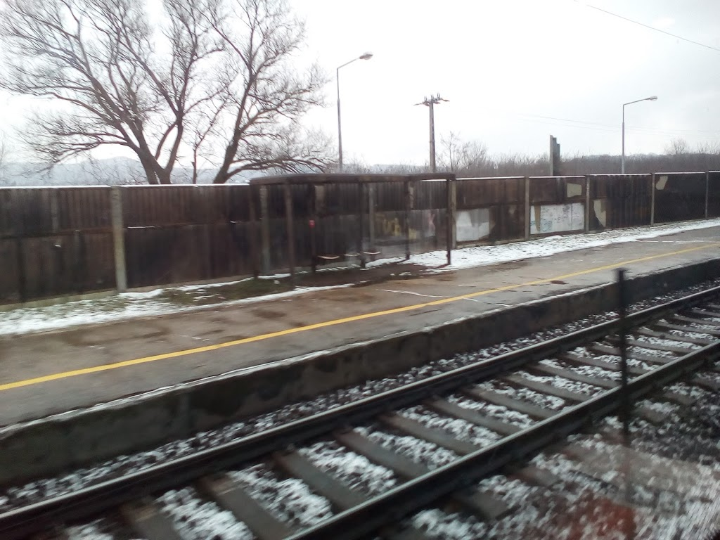 Alsógalla megállóhely